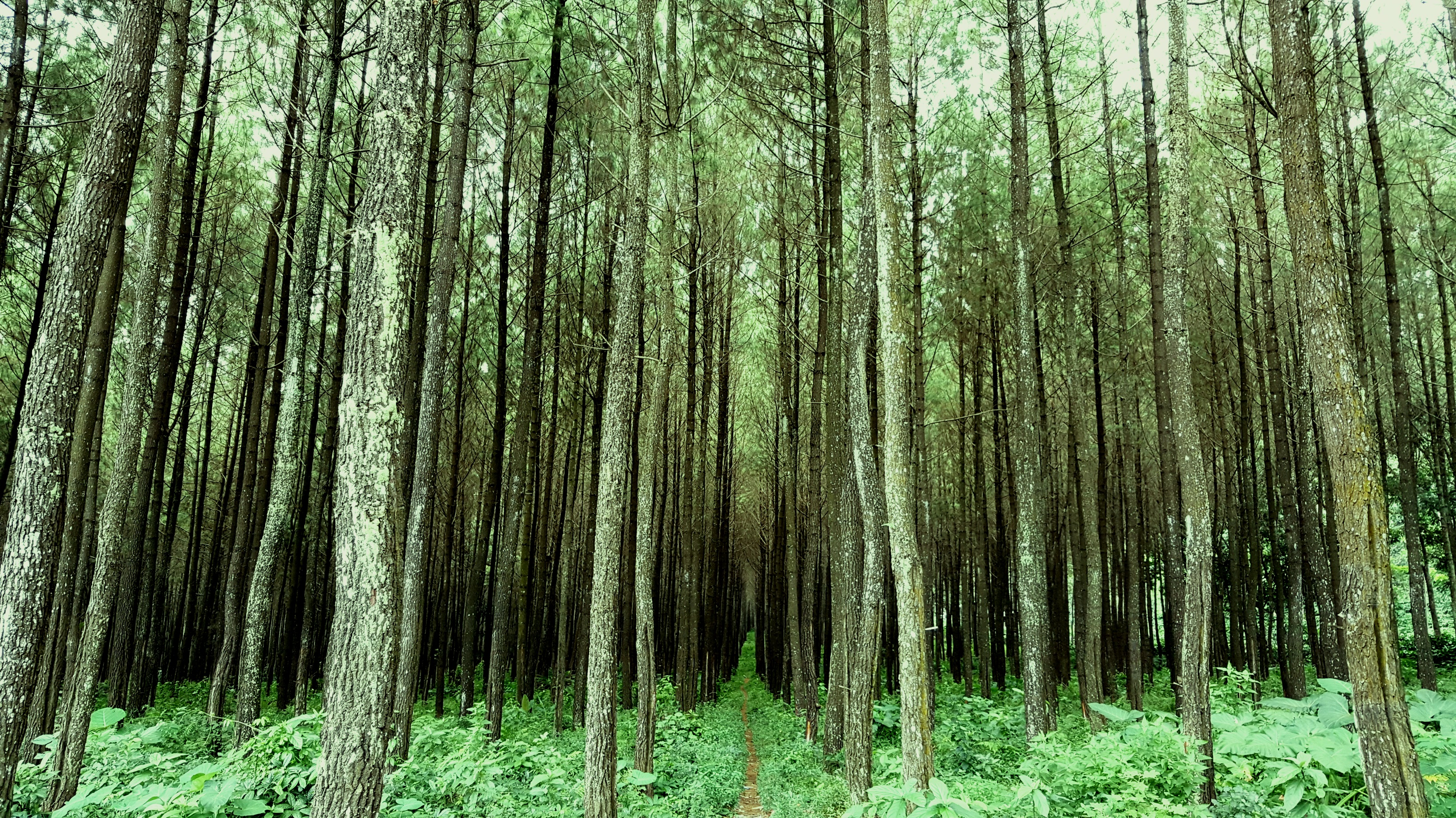 Hutan karet di pegunungan gumitir, Jember.